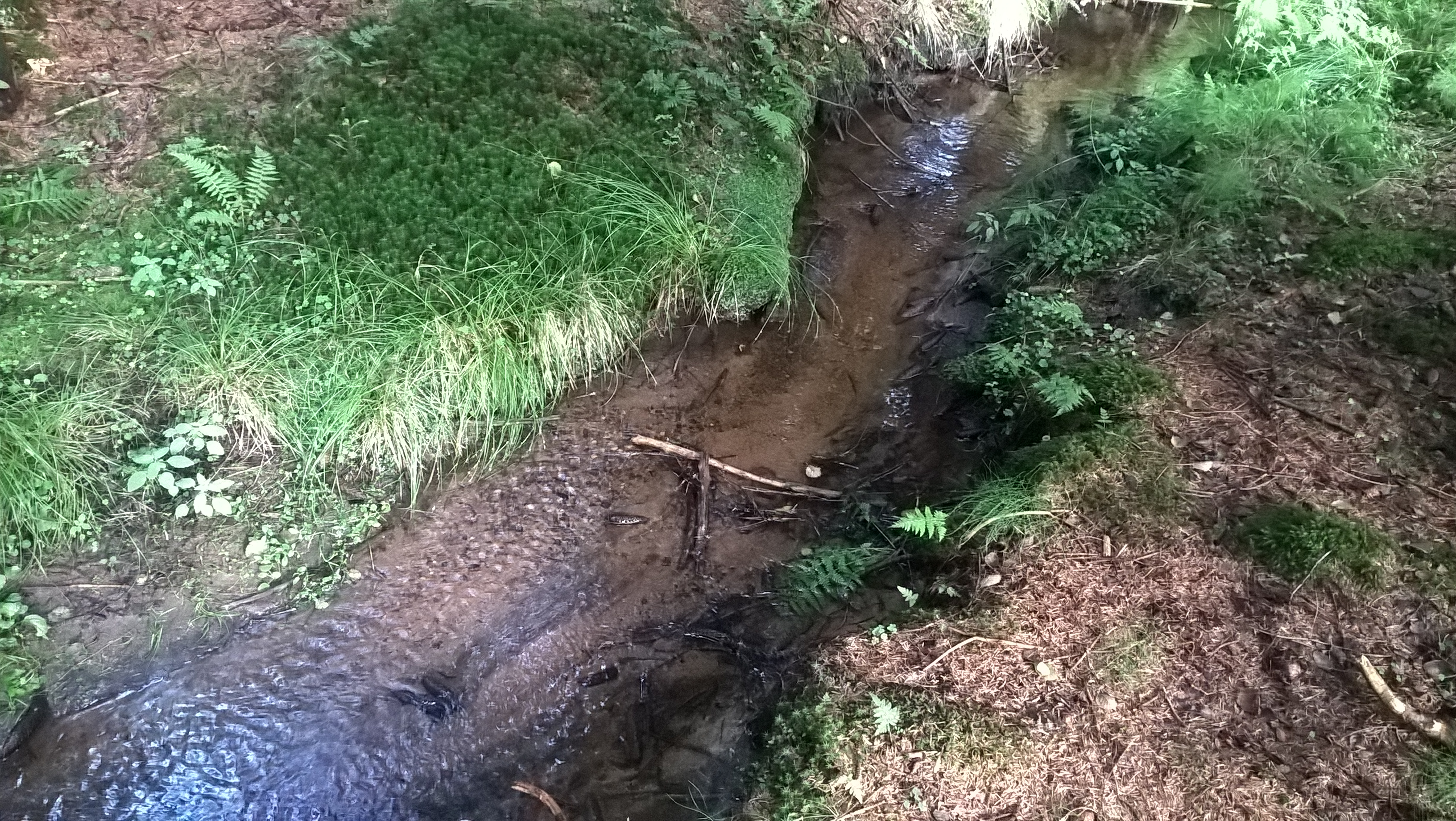 Křivoláčský potok v Orlovech u Wolkerova památníku